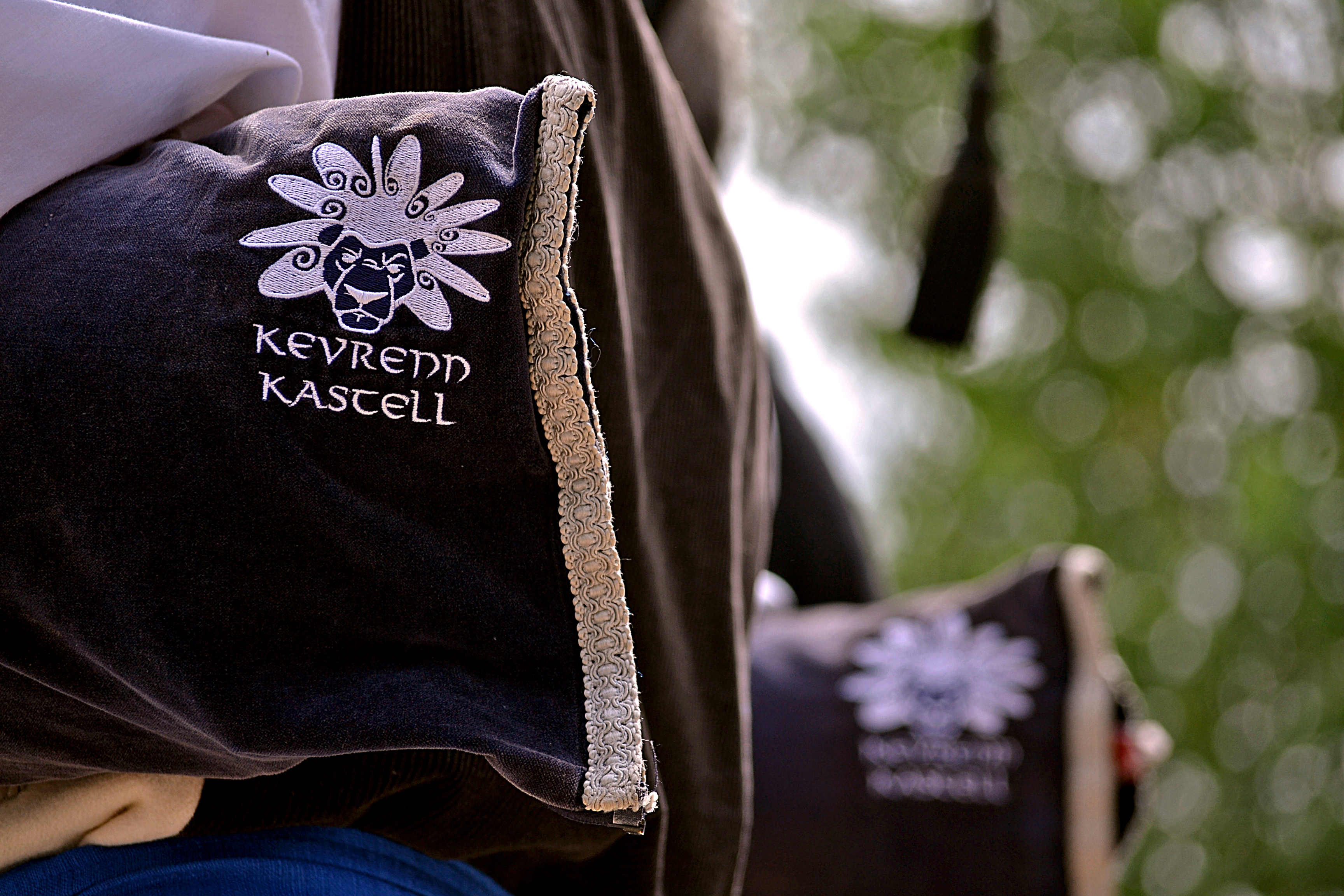 La Kevrenn Kastell au festival Gouel an Eost à Plougoulm le 9 août 2015.